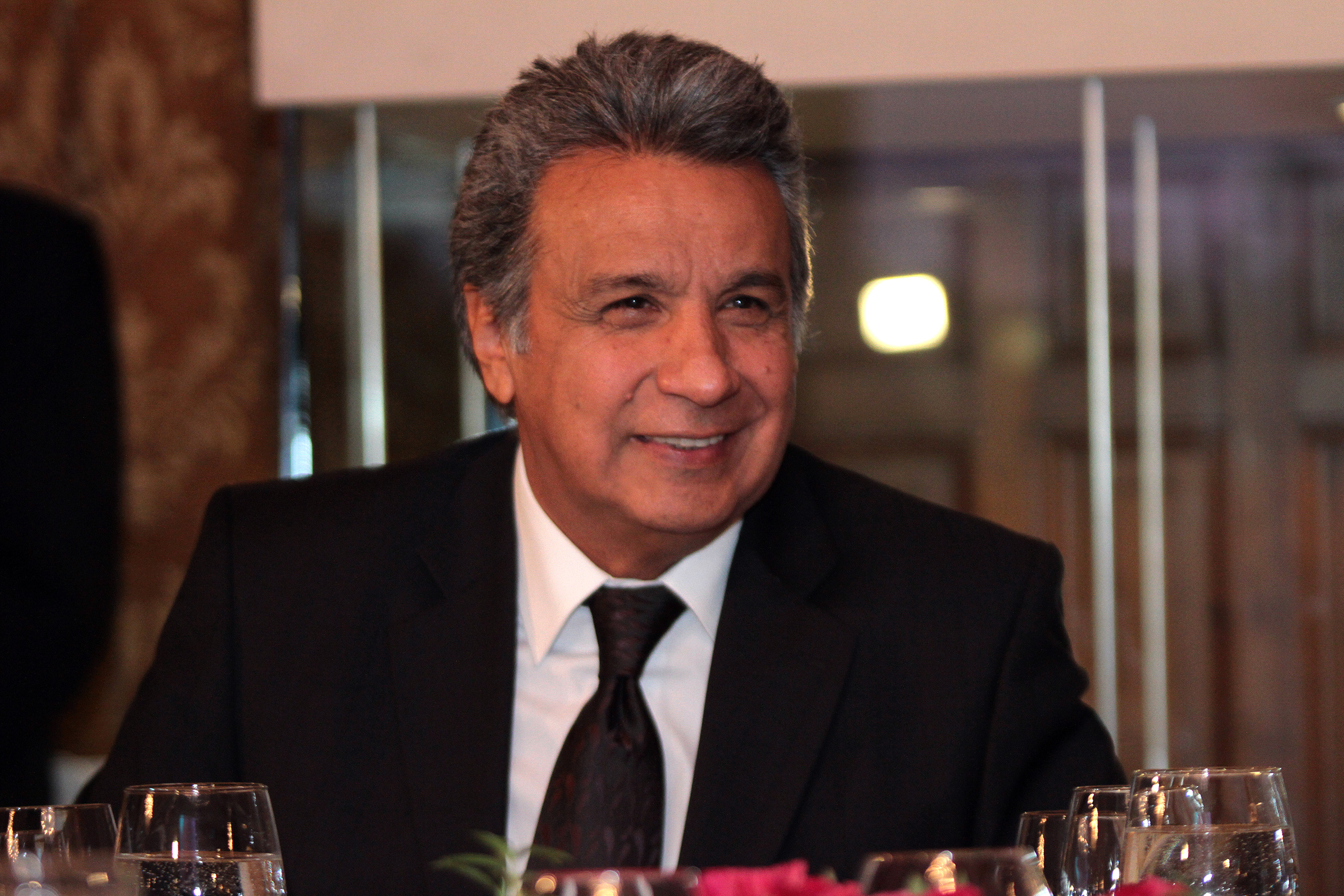 Quito, 16 mar (ANDES).- En Carondelet se celebró una cena en honor a Lenin Moreno por su cumpleaños y en despedida por su retorno a Ginebra. Fotografías: Carlos Rodríguez/ANDES.